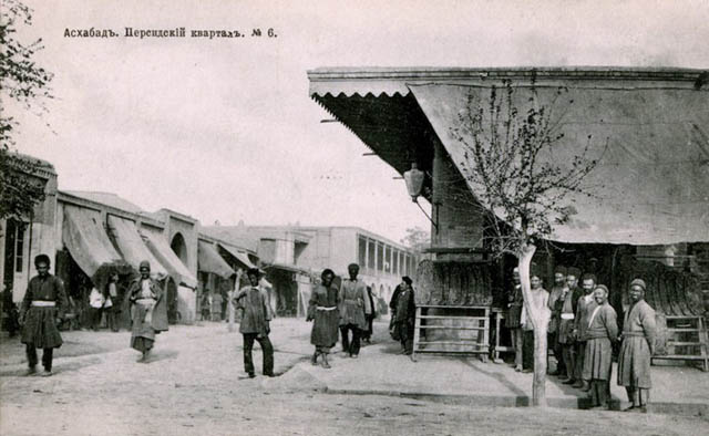 Кварталы азербайджанцев(тюрков,персов) в Ашхабаде